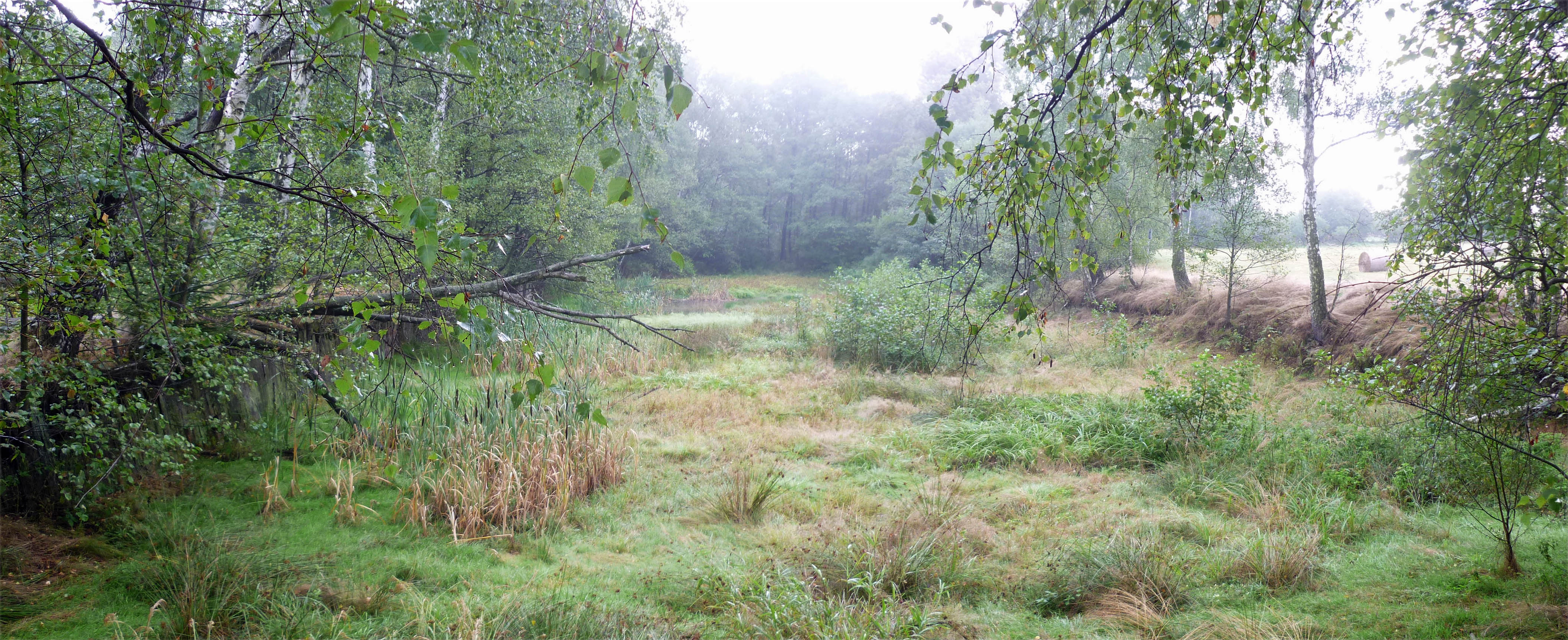 Ehemaliger Mühlteich in Hungertuch (Hladov) bei Peterswald (Petrovice)